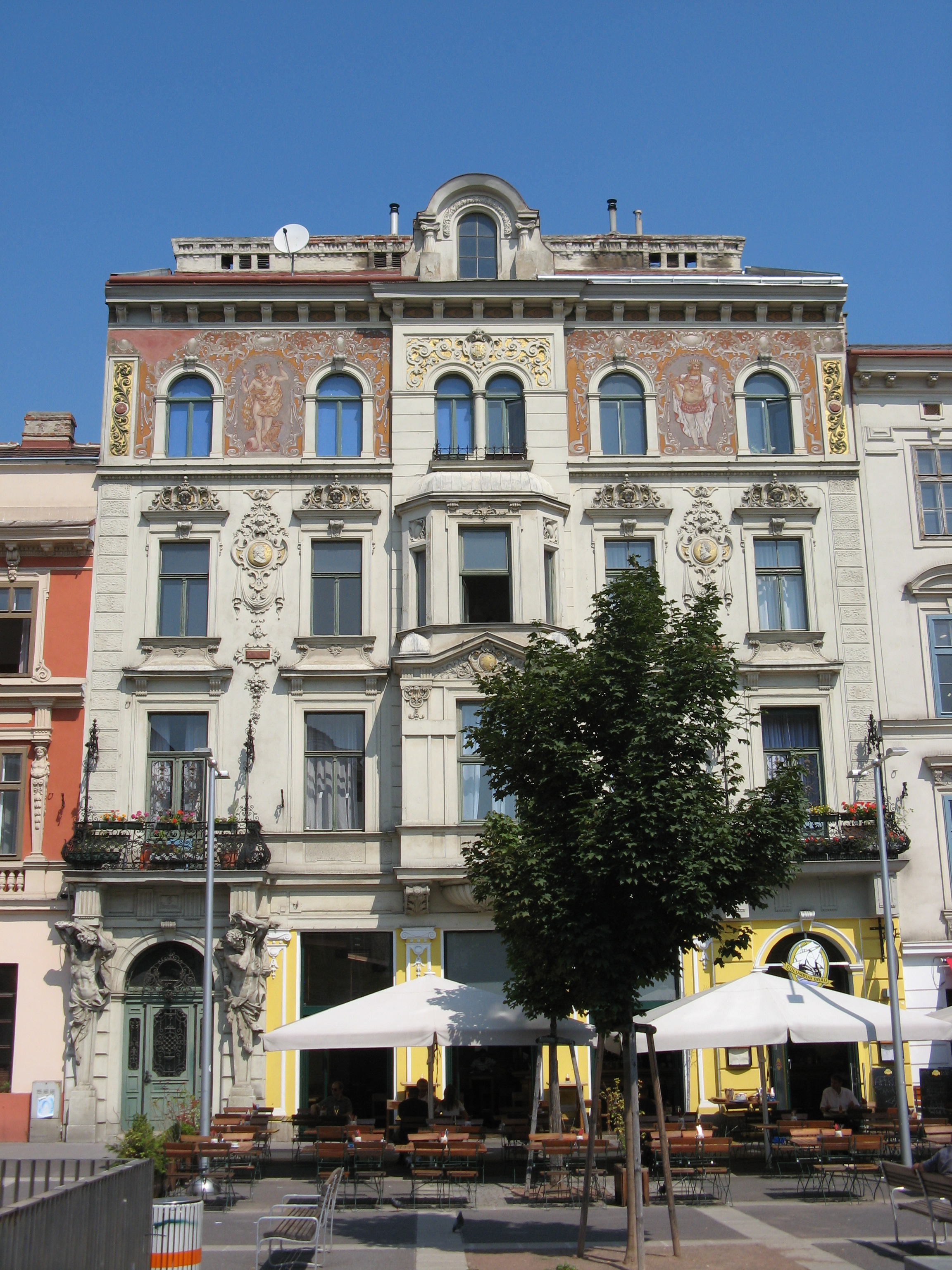 Columbusplatz 6, Wien-Favoriten